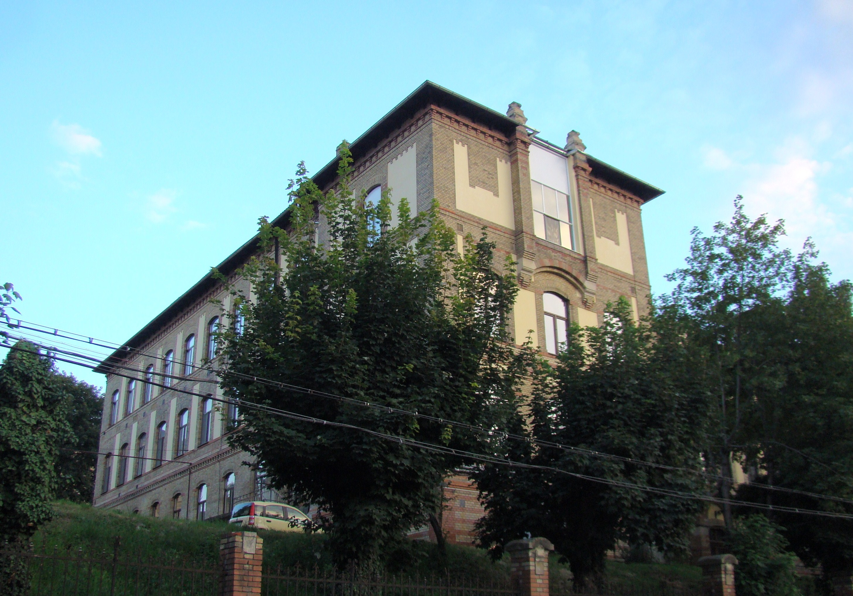 Ansamblul clinicilor universitare